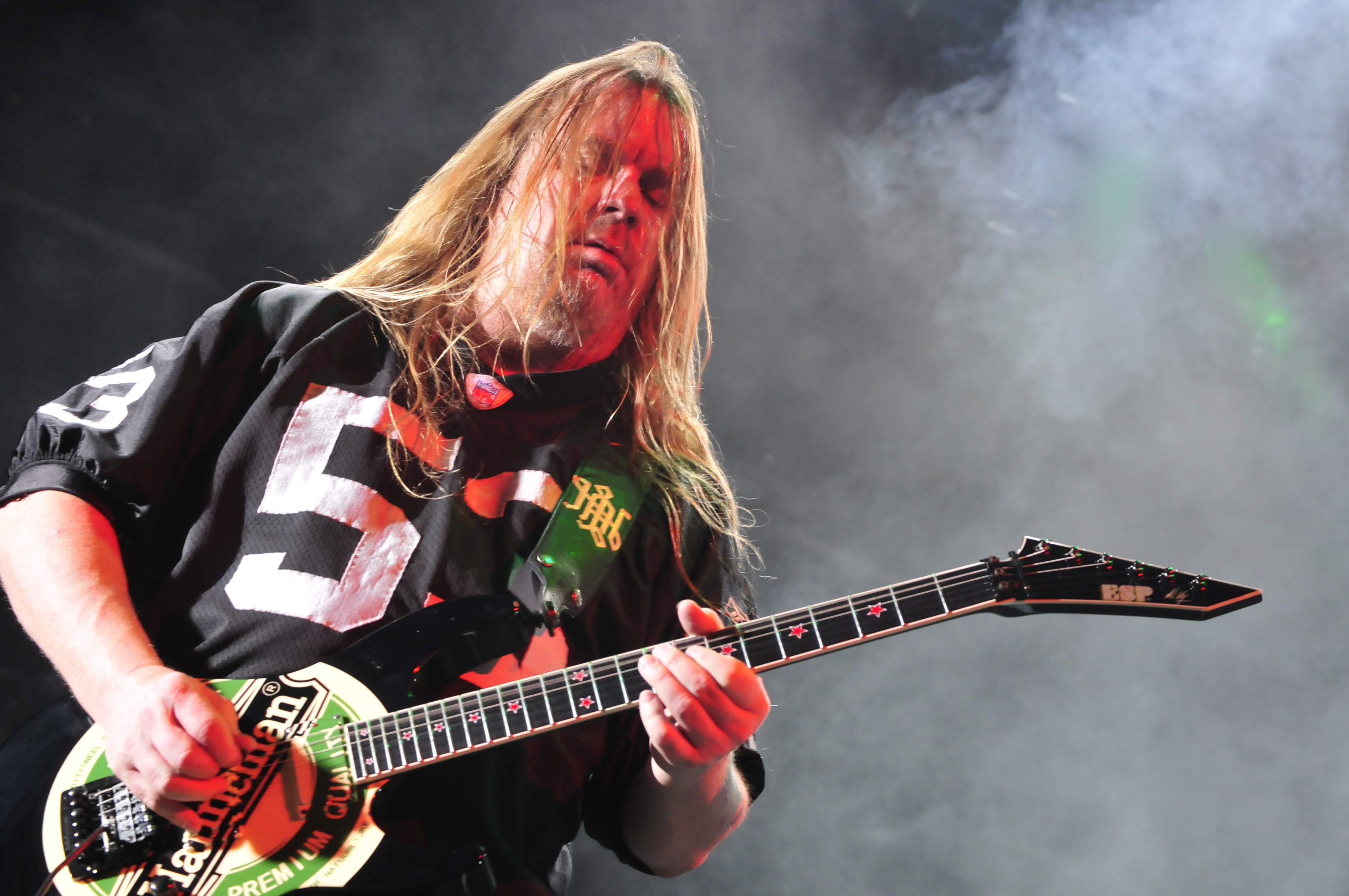 Jeff Hanneman con gli Slayer al Mayhem Fest di Hartford